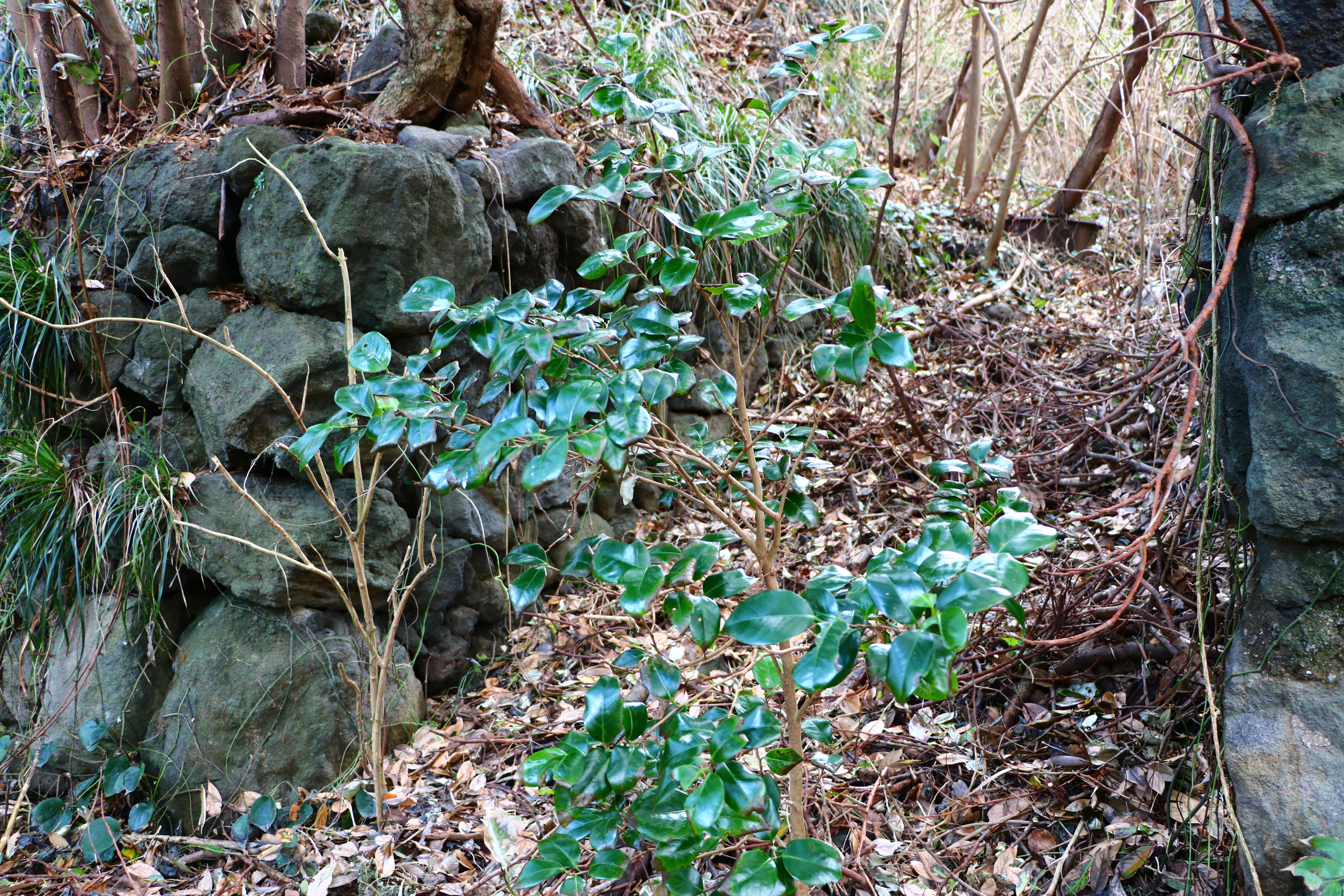 八丈小島鳥打地区跡（東京都八丈町）